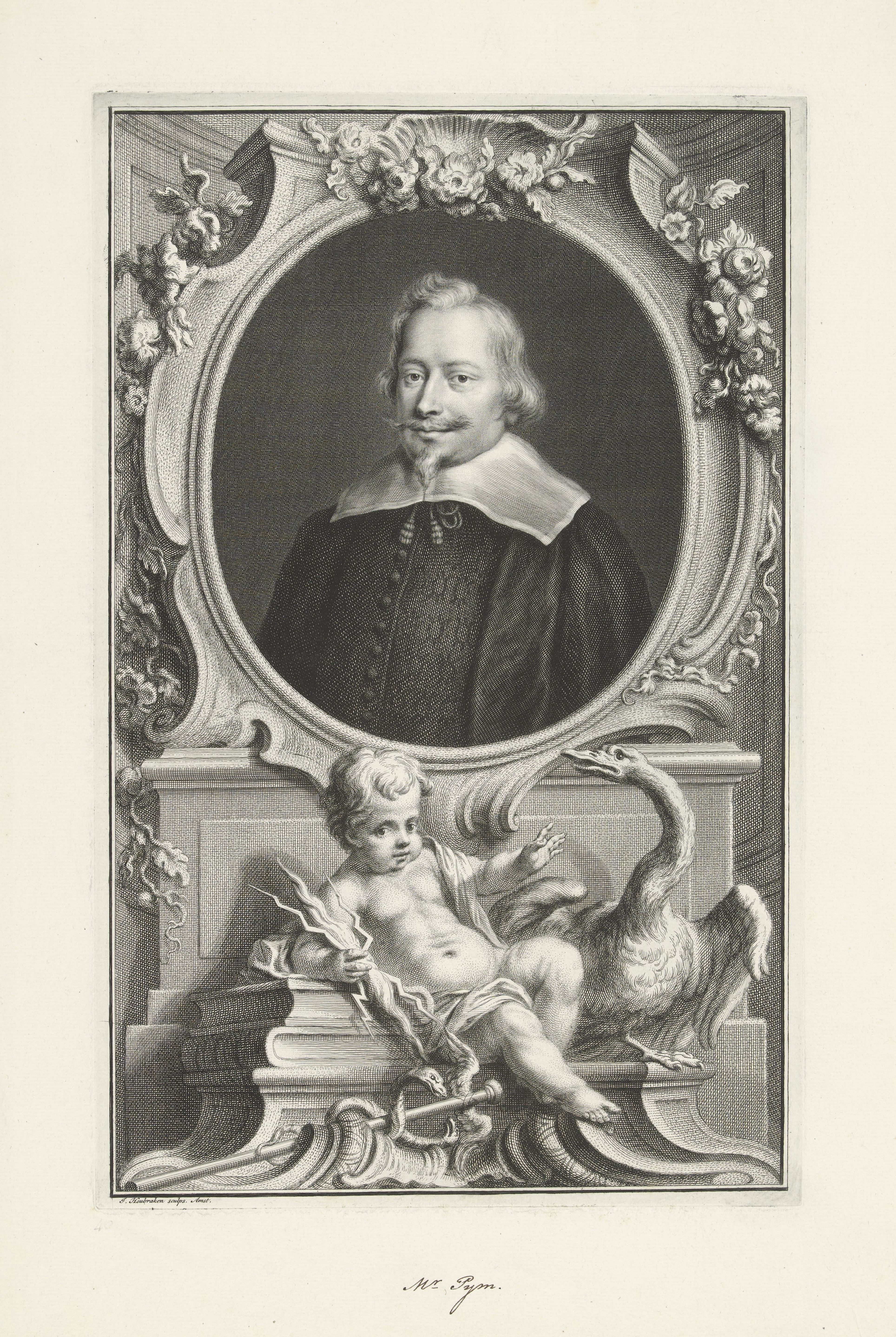 IdentificatieTitel(s): Portret van John PymObjecttype: prent Objectnummer: RP-P-OB-48.321Catalogusreferentie: Ver Huell 401(2)Opmerking: 2 staten bekendOpschriften / Merken: verzamelaarsmerk, verso linksonder, gestempeld: Lugt 240naam, recto midden onder, handgeschreven: ‘Mr. Pym’Omschrijving: Portret van de parlementariër en criticus John Py. Onder het portret een putto met in zijn rechterhand een bliksemschicht. Rechts een zwaan en op de grond een caduceus, respectievelijk als attribuut van Apollo en symbool van de welsprekendheid en de rede.VervaardigingVervaardiger: prentmaker: Jacob Houbraken (vermeld op object)Plaats vervaardiging: AmsterdamDatering: 1736 - 1738Fysieke kenmerken: ets, gravure en pen; proefdrukMateriaal: papier Techniek: etsen / graveren (drukprocedé) / penAfmetingen: plaatrand: h 368 mm × b 233 mmToelichtingPrent ook gebruikt in: Thomas Birch. The heads of illustrious persons of Great Britain : engraved by Houbraken, and Vertue, with their lives and characters. London: John en Paul Knapton, 1743-1751.OnderwerpWat: caduceus (staff with two snakes, attribute of Mercury)water-birds: swanattributes of Jupiter: thunderbolt (+ variant)Wie: John PymVerwerving en rechtenVerwerving: overdracht van beheer 1816Copyright: Publiek domein